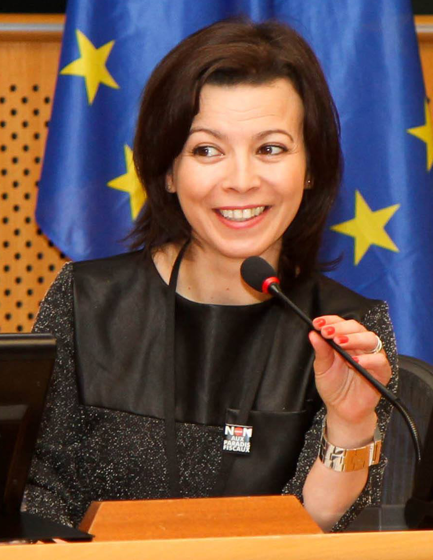 Eurodeputada Liliana Rodrigues